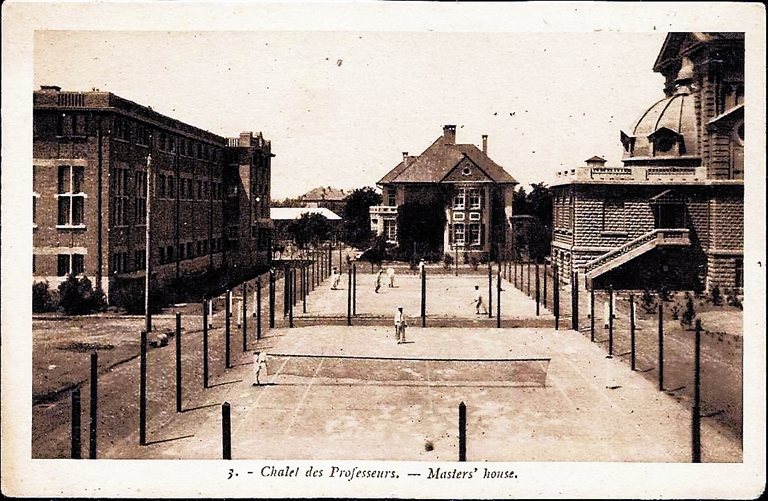 中文（中国大陆）: 北疆博物院及天津工商学院